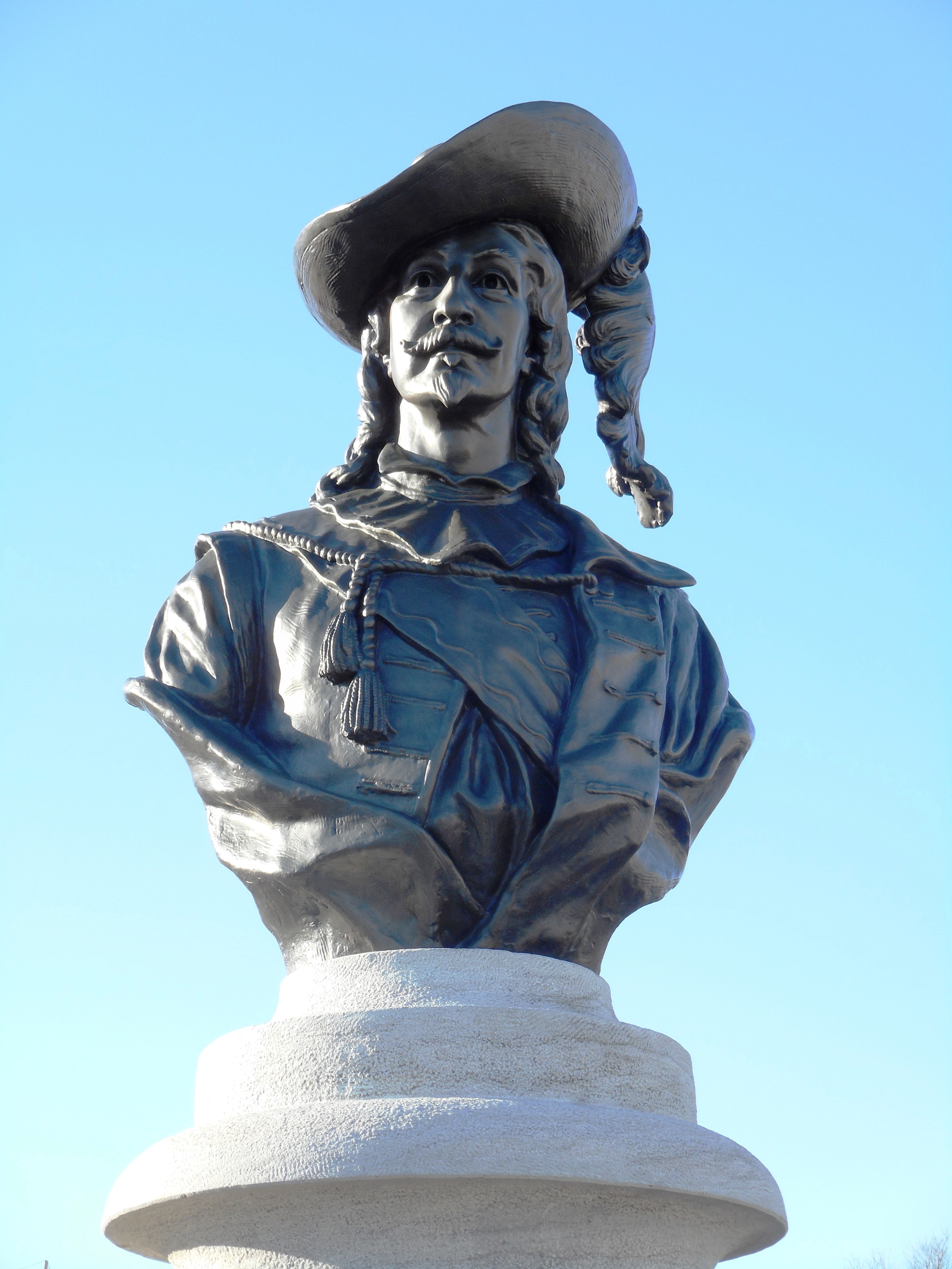 Monument de Pierre Du Gua de Monts, par Hamilton MacCarthy, érigé en 2007 sur l'avenue Saint-Denis, près de la Citadelle de Québec